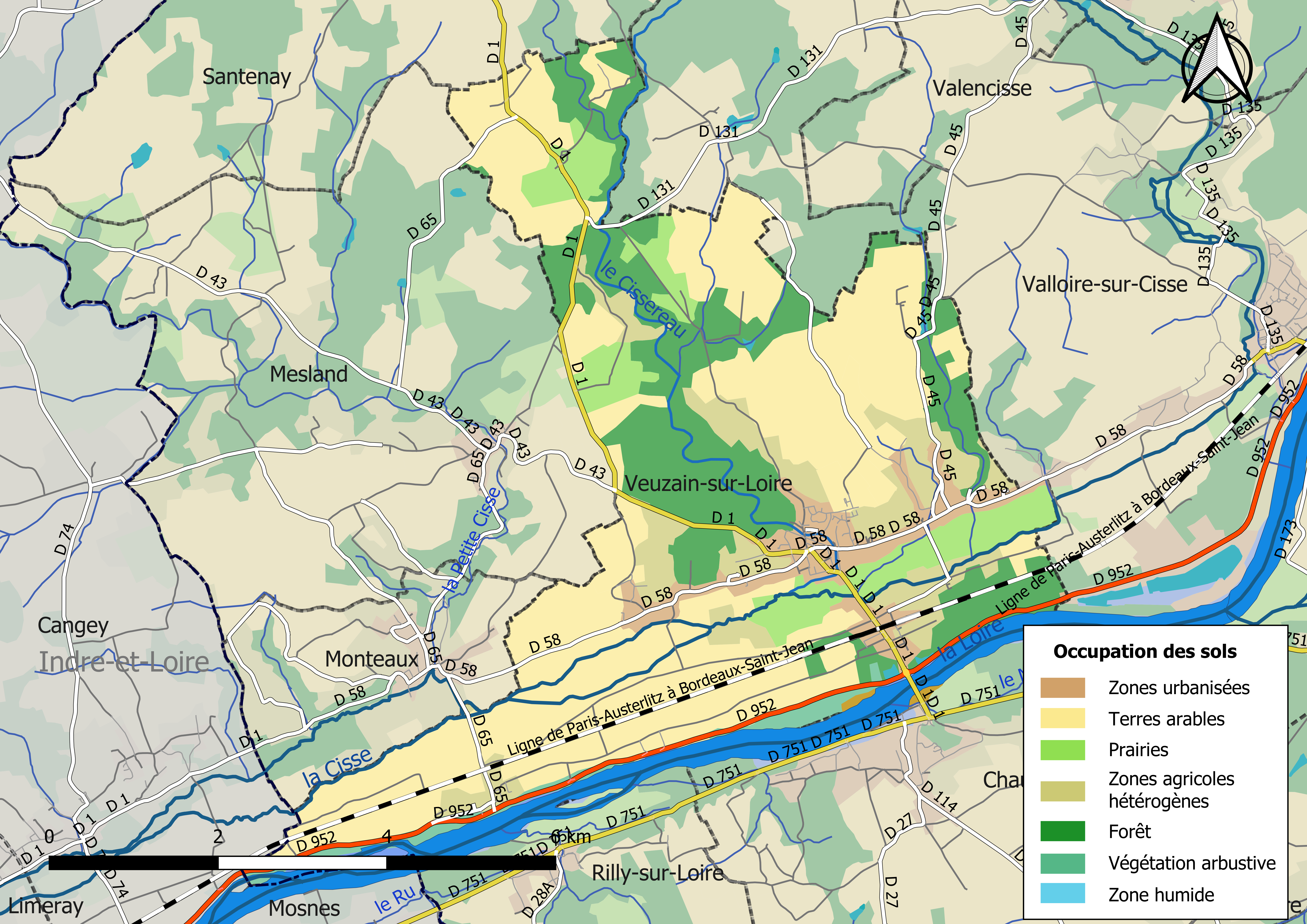 Carte des infrastructures et de l’occupation des sols en 2018 de la commune de Veuzain-sur-Loire (France).